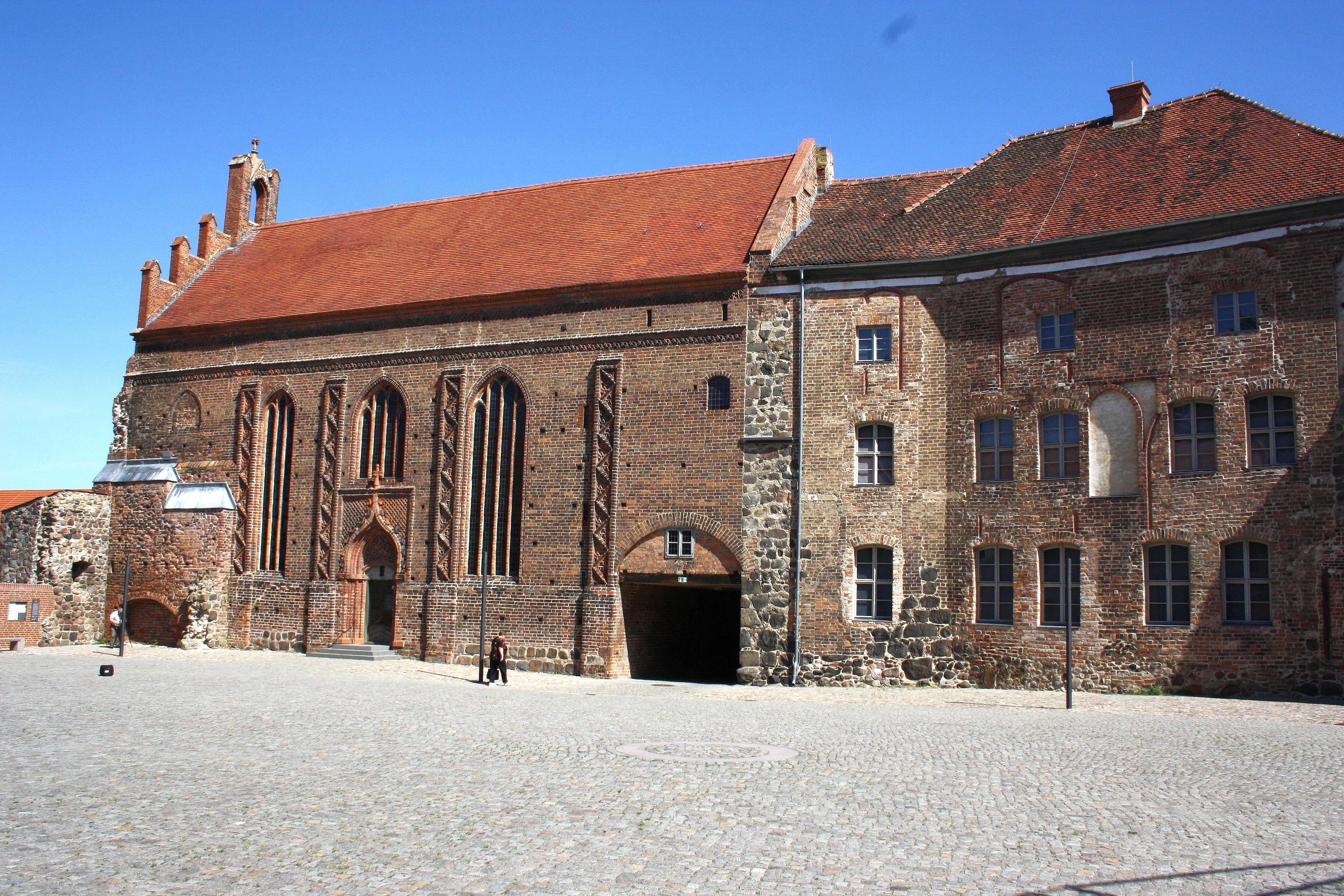 Bischofsburg Ziesar ab 1327 - ehemals Slawenburg auf Halbinsel